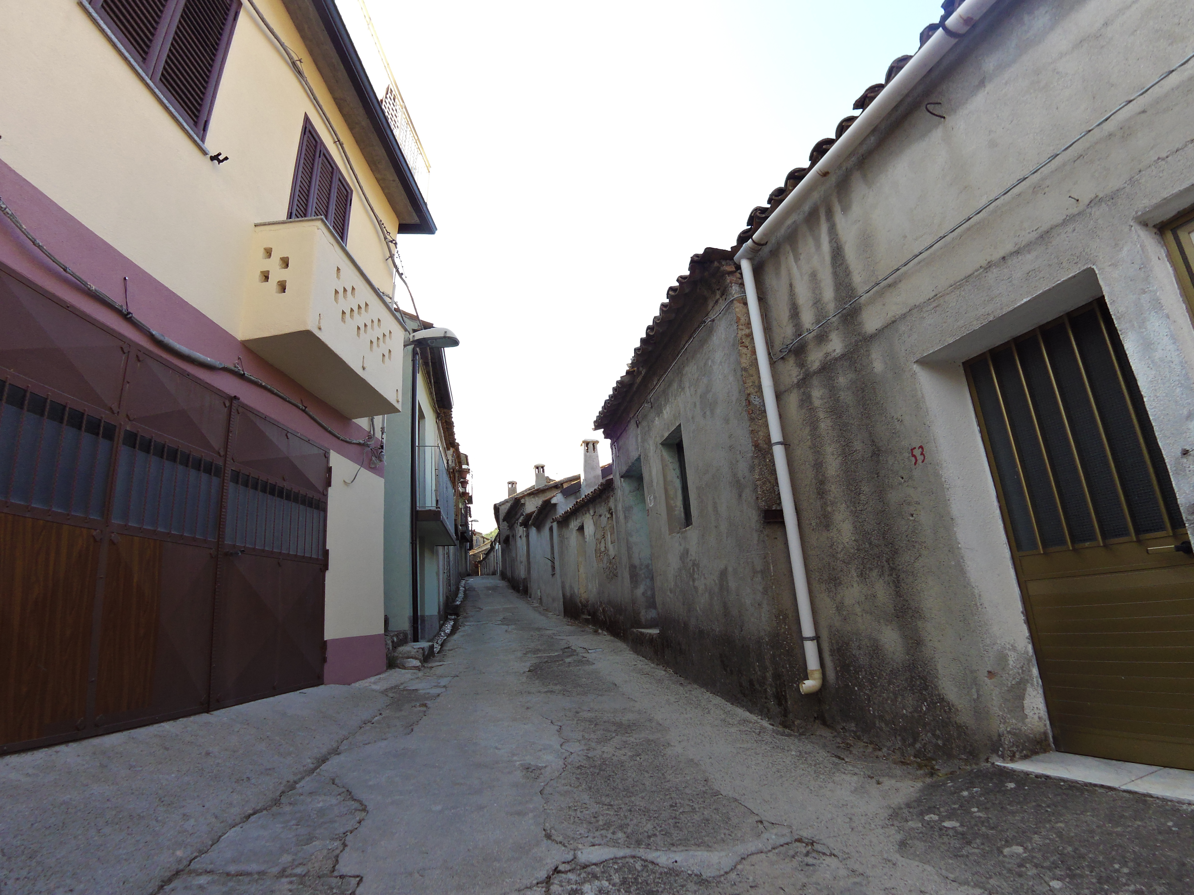 Nardodipace vecchio abitato strada principale 2